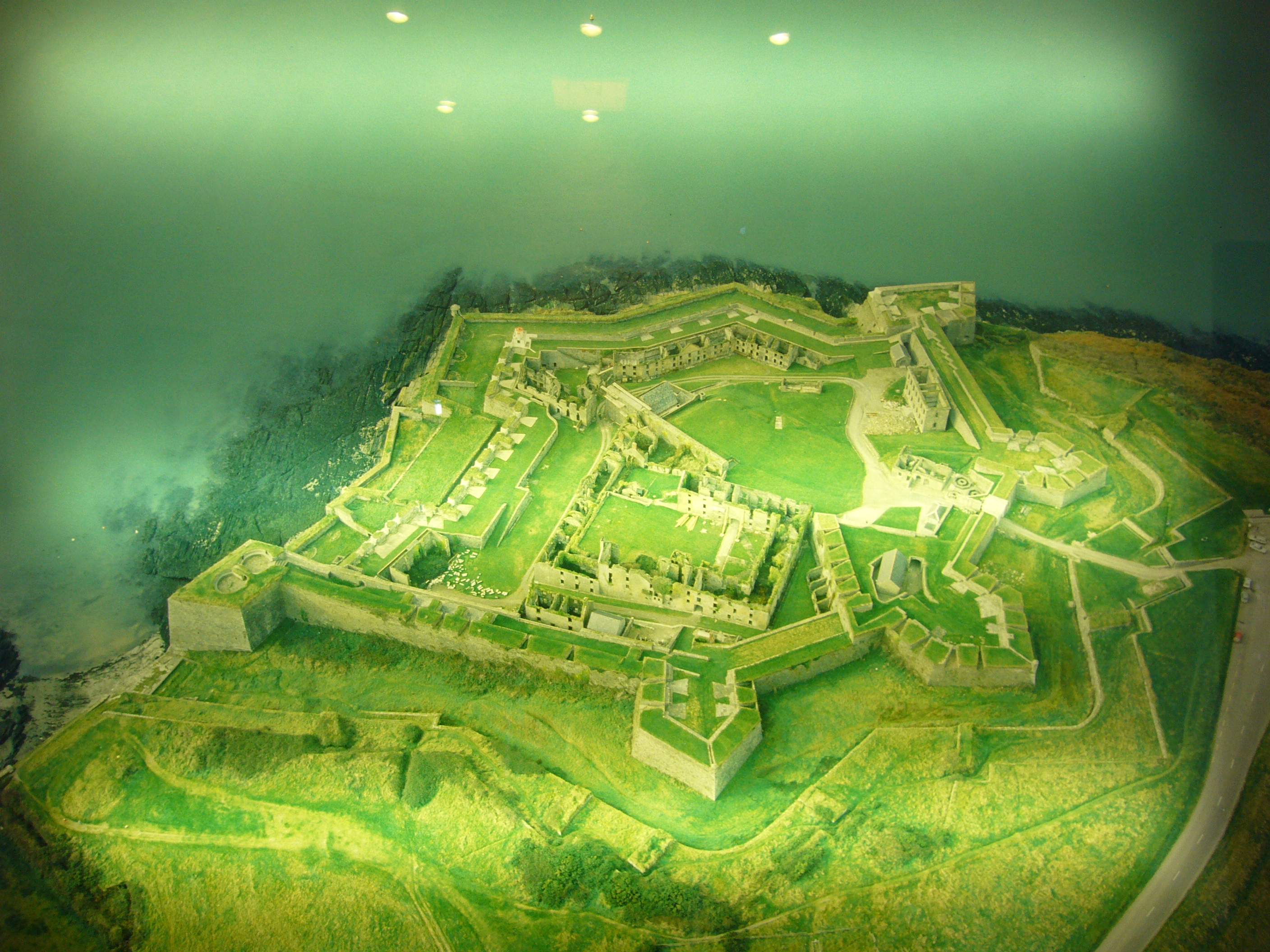 Charles Fort, Kinsale. Photo aérienne du hall d'accueil